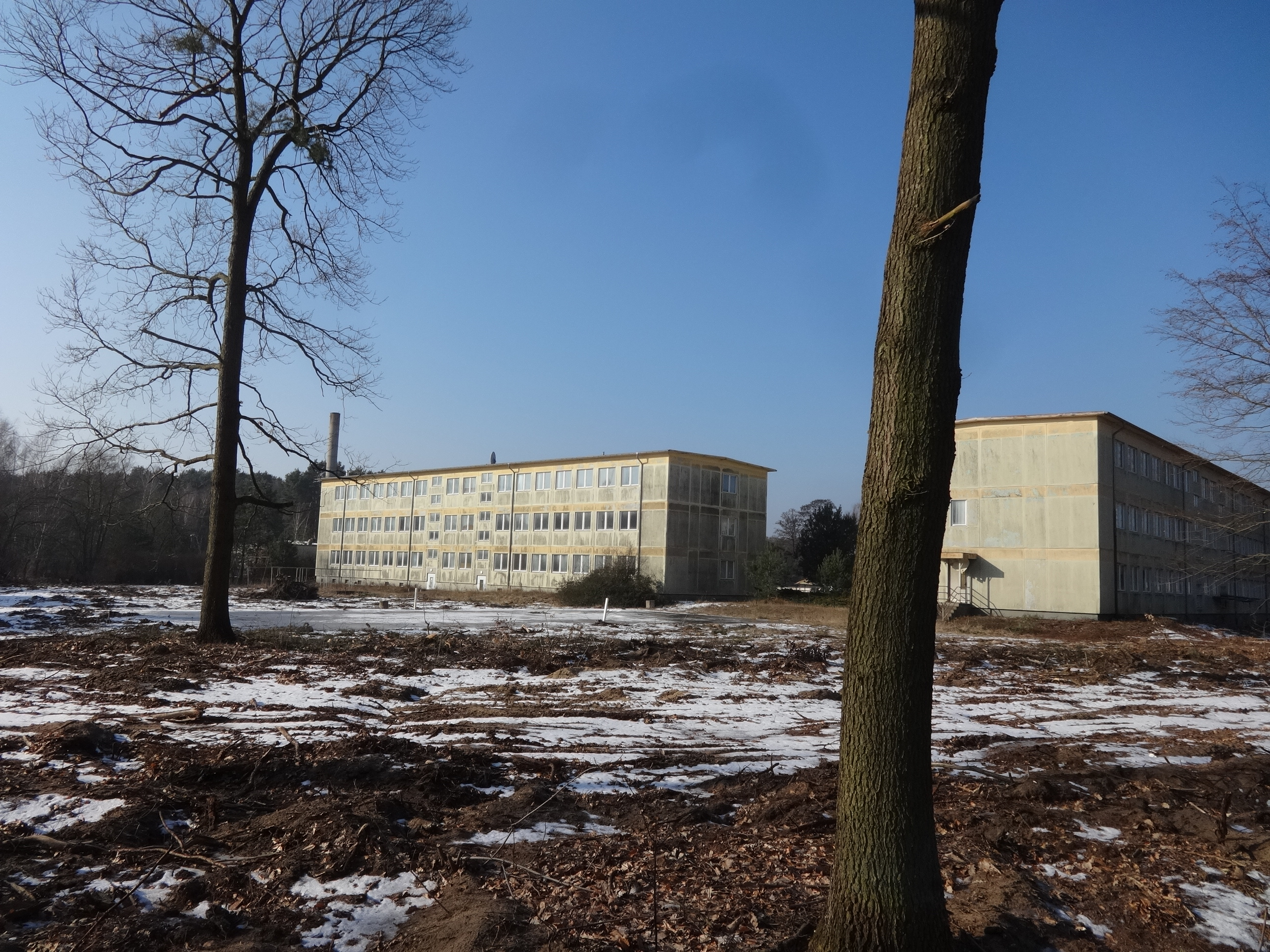 Neubrück, ein Wohnplatz der Gemeinde Groß Köris im Landkreis Dahme-Spreewald in Brandenburg